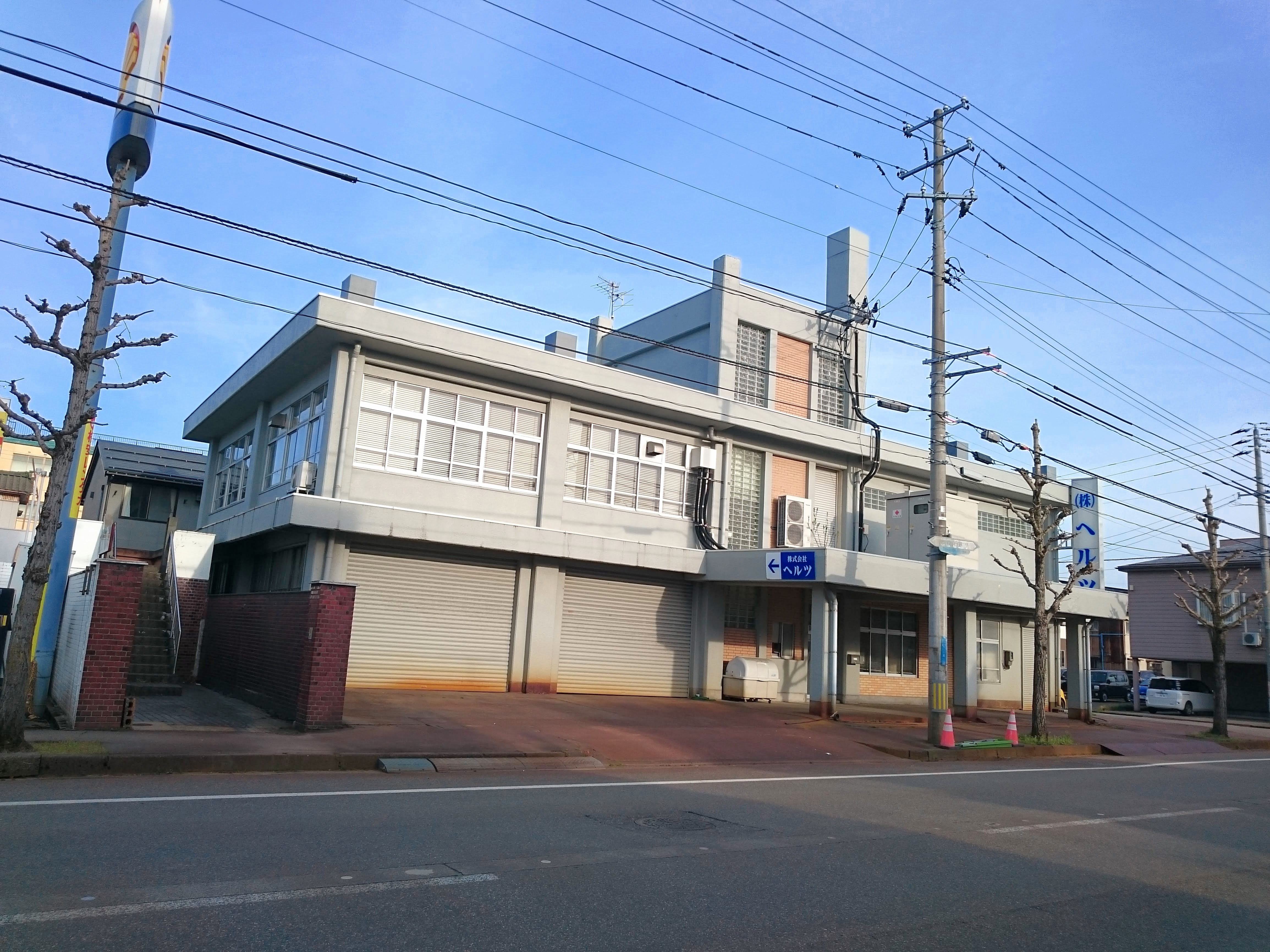 ヘルツ株式会社の本社外観